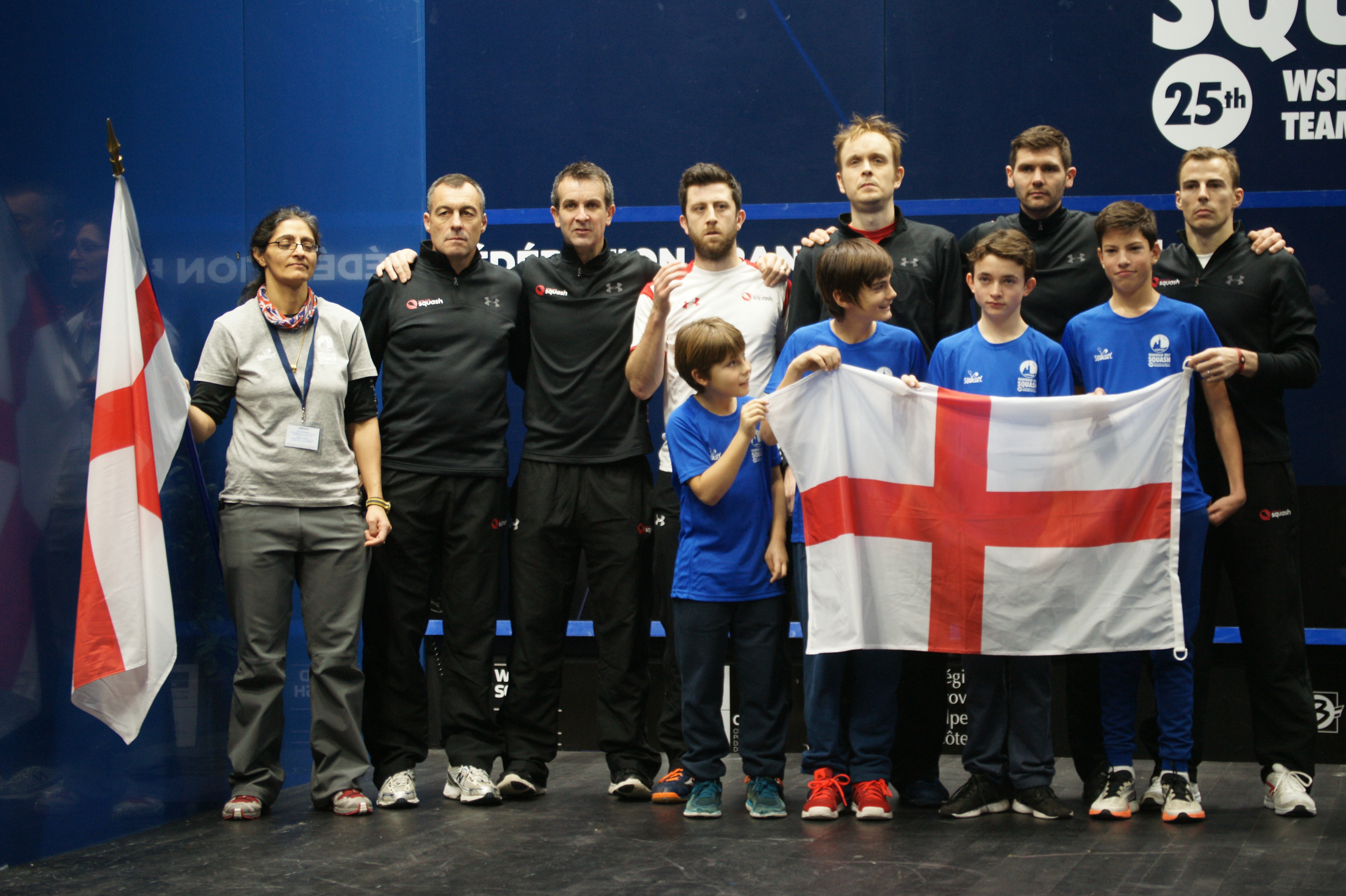 équipe d'Angleterre, championnats du monde de squash par équipe Marseille 2017